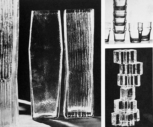 Konstglas och bruksglas av formgivaren Christer Sjögren